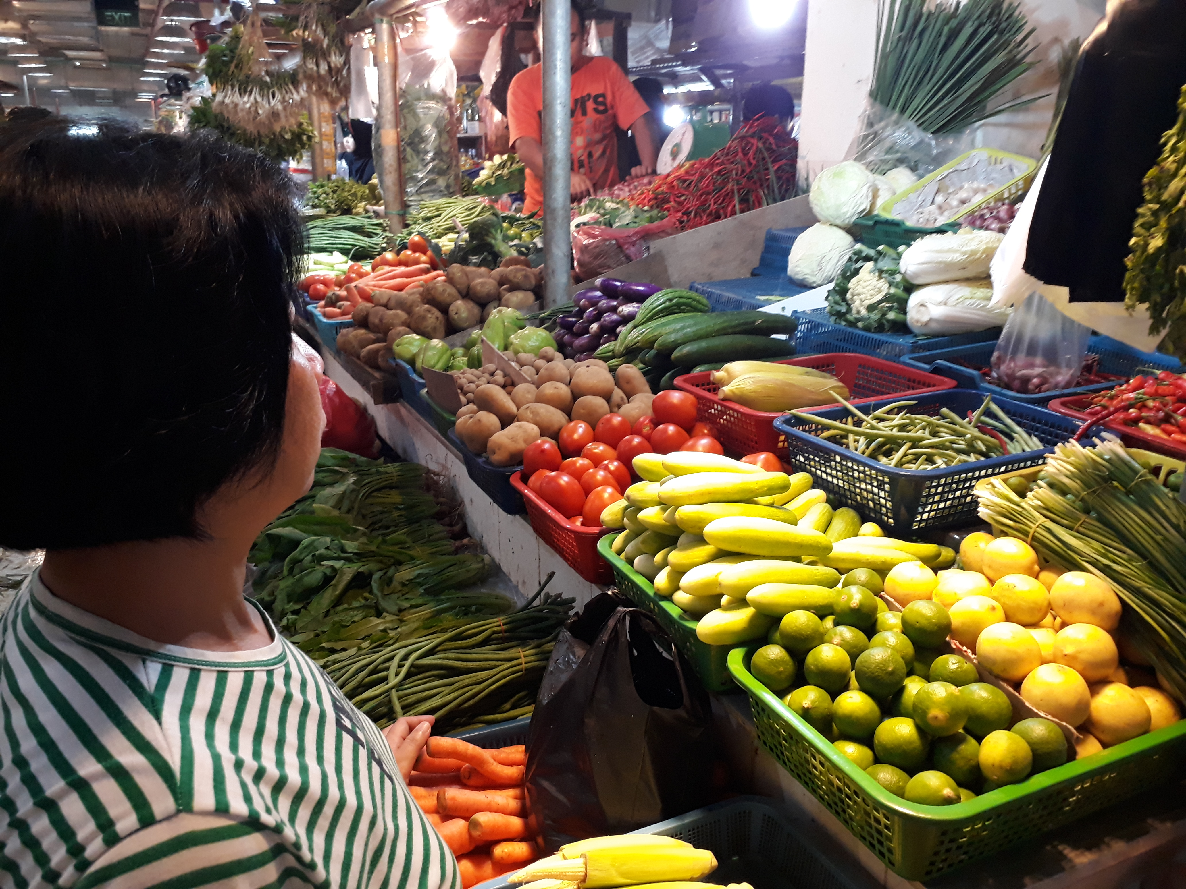 A vegetable market in Senen Market.